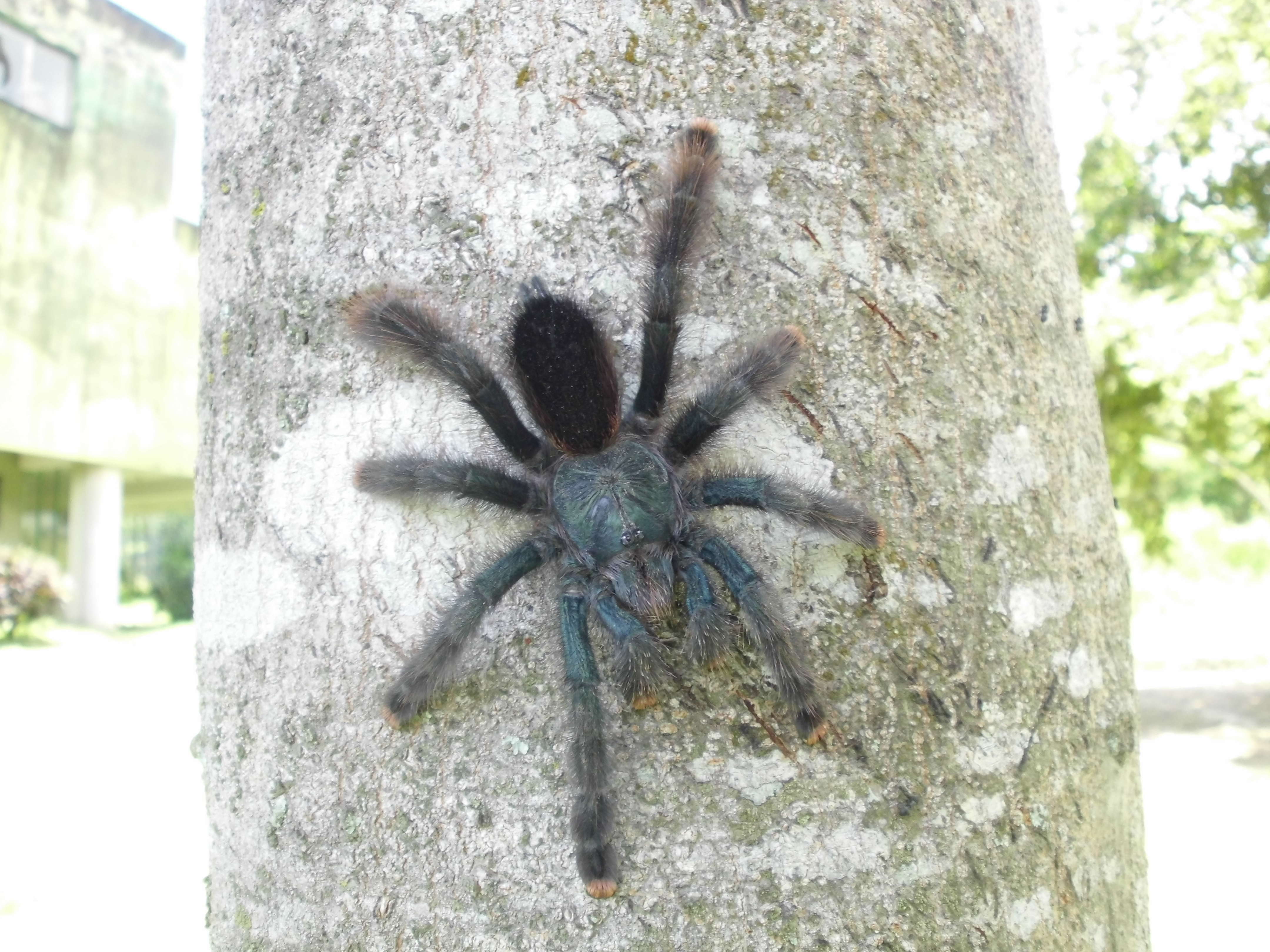 ARAÑA ARBORICOLA